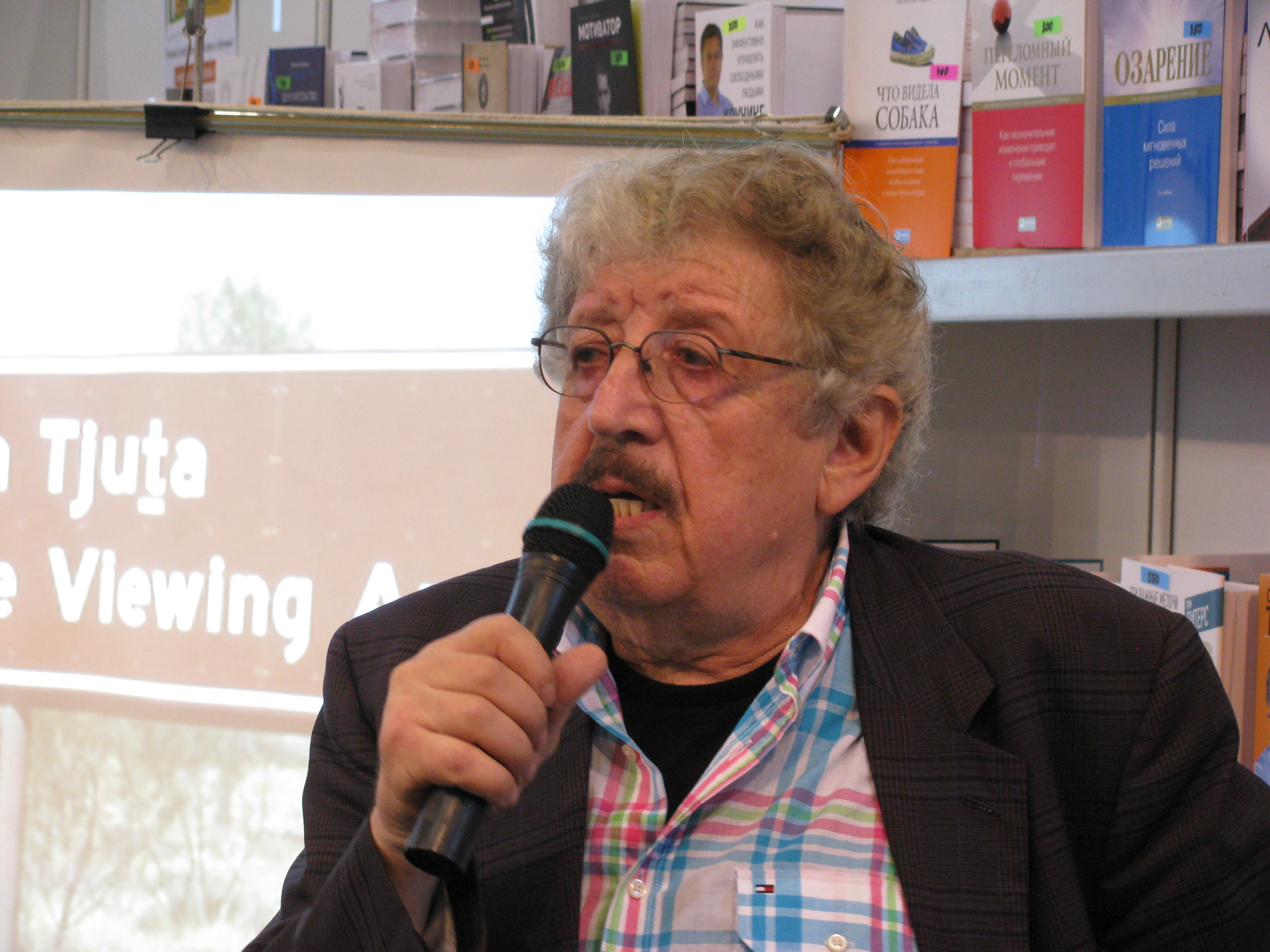 Сол Шульман на ММКВЯ-2011